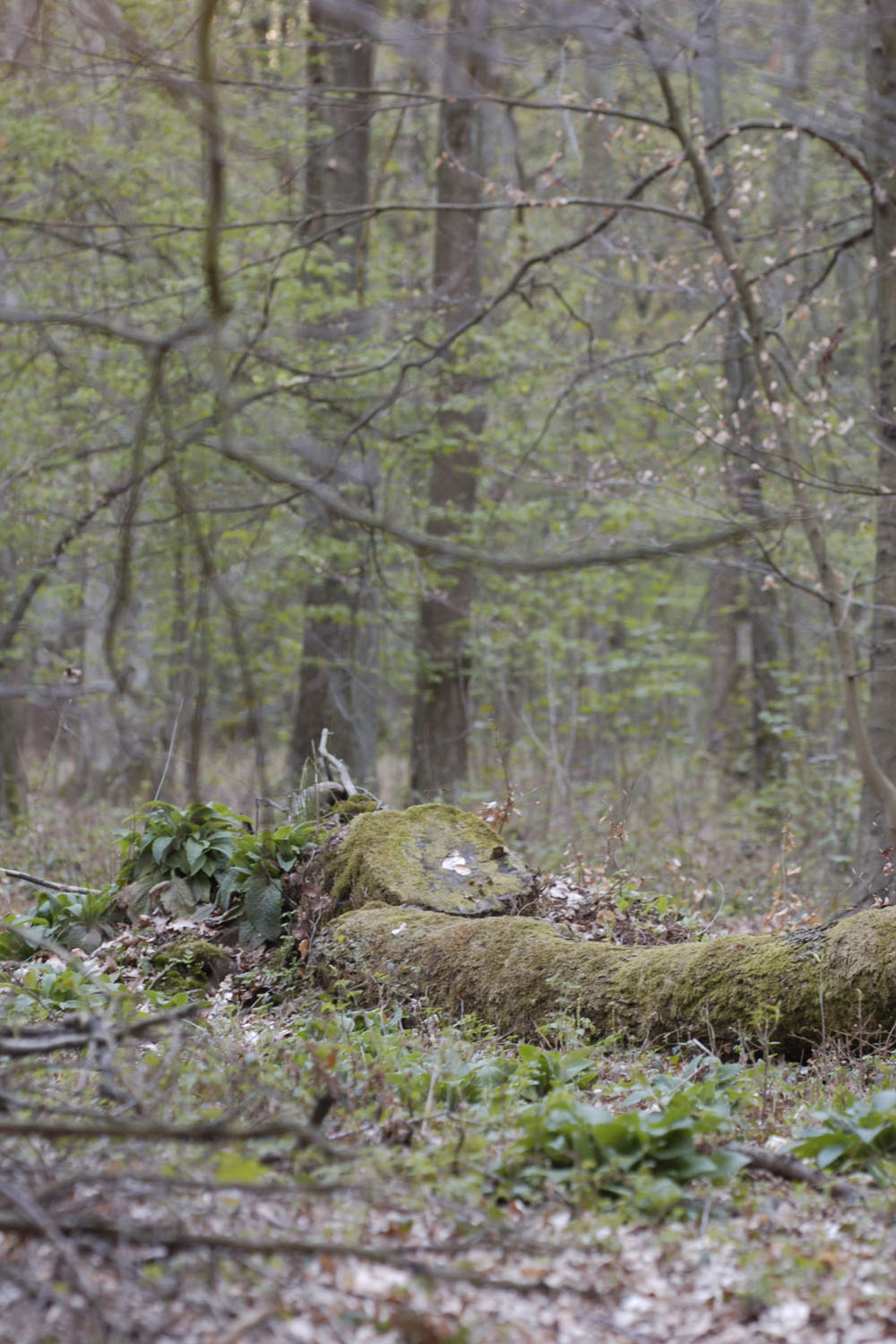 Naturwaldzelle Hinkesforst bei Ratingen, April 2009